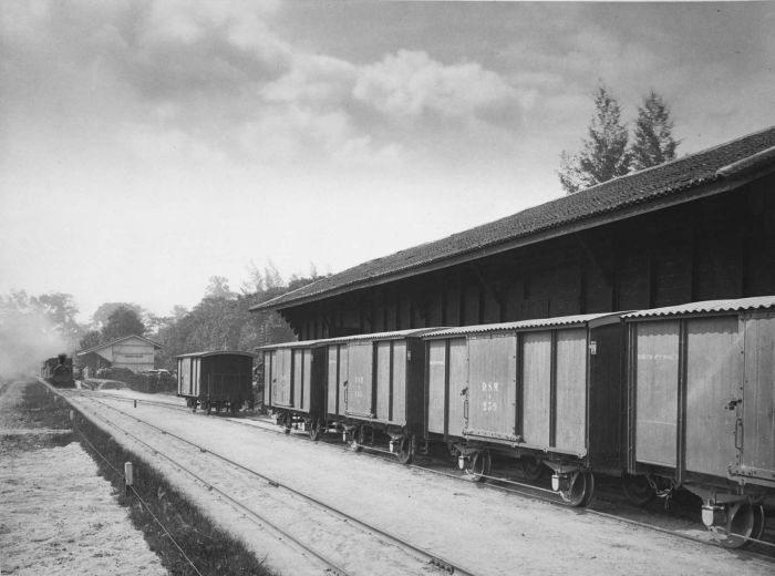 Foto. Een binnenrijdende stoomtrein en stilstaande goederenwagons op station Loeboeg Pakam